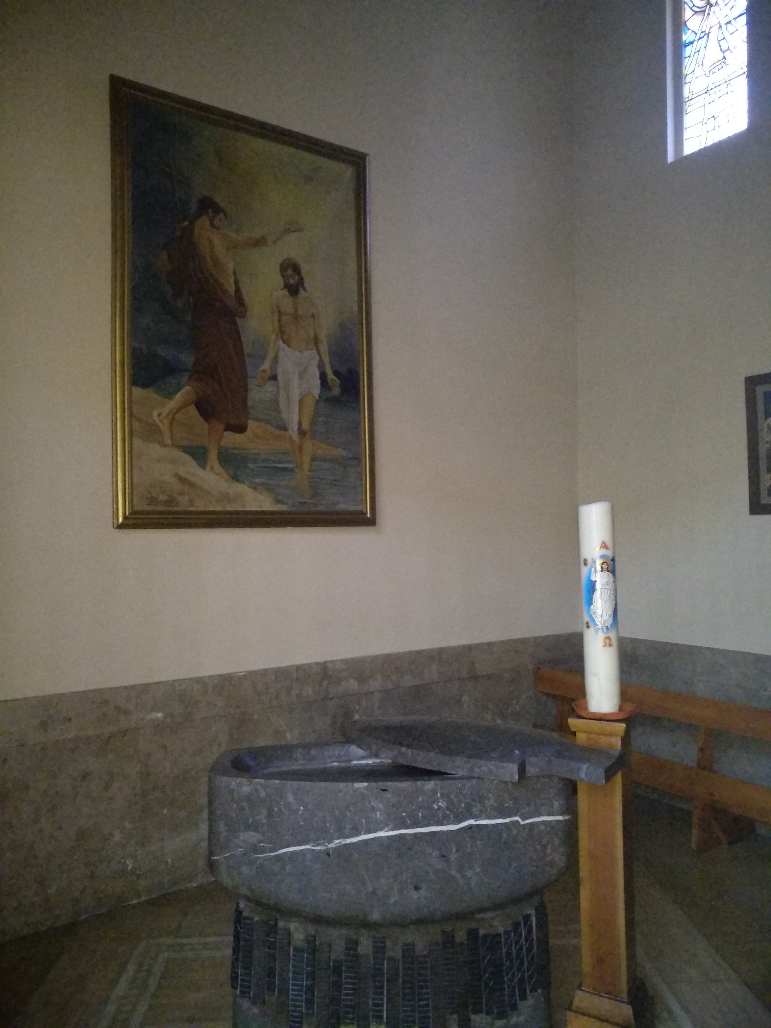 Iglesia de San Francisco Javier (Pamplona)